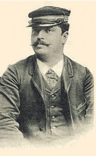 Édouard Surcouf partie droite d'une photographie prise à Prague en 1891